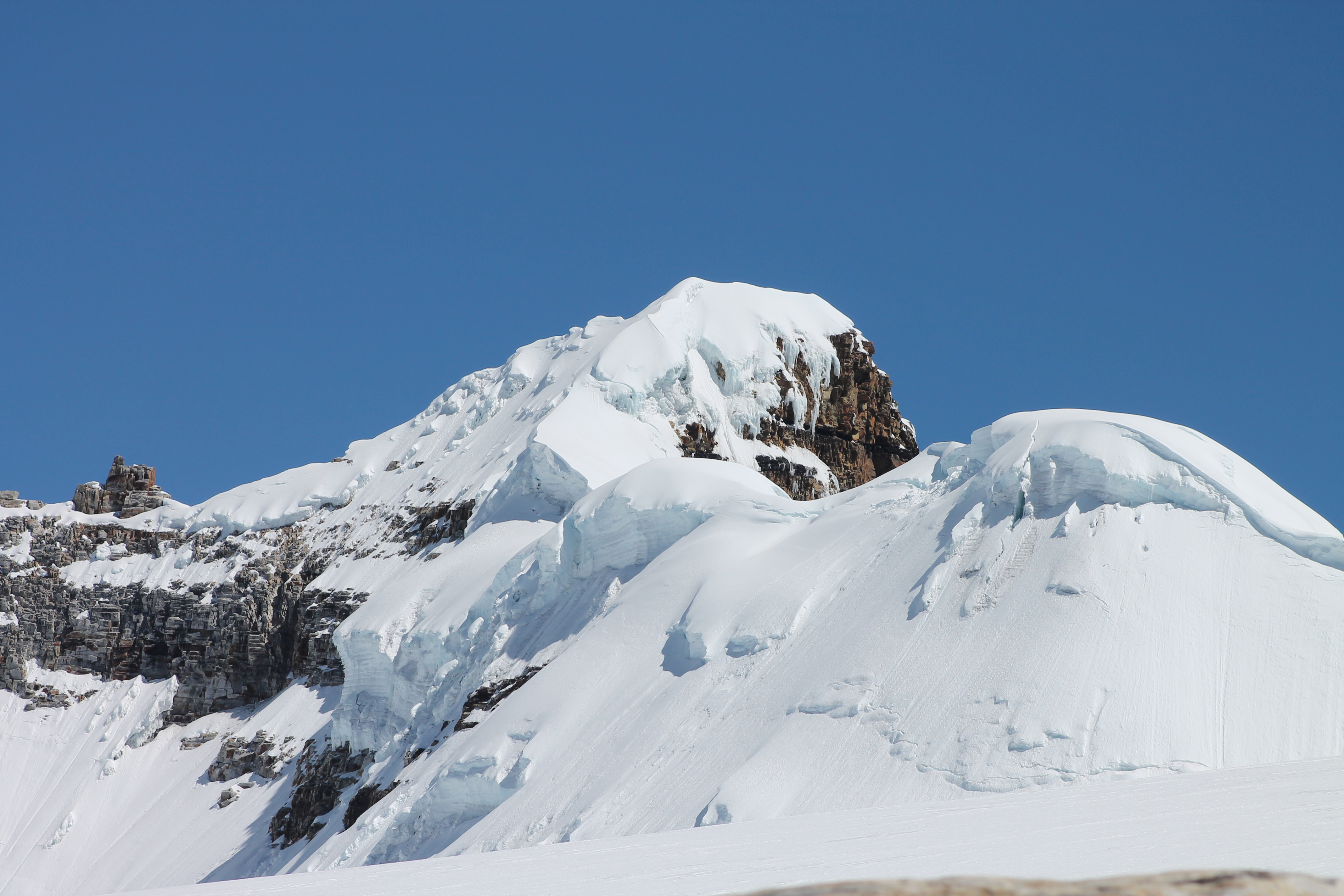 este pico es de dificil acceso debido a las fracturas en el hielo lo cual crea profundas grietas donde han muerto algunos montañistas desprevenidos. Esta fotografía fue tomada en un área protegida de Colombia con el código 82 del RUNAP.